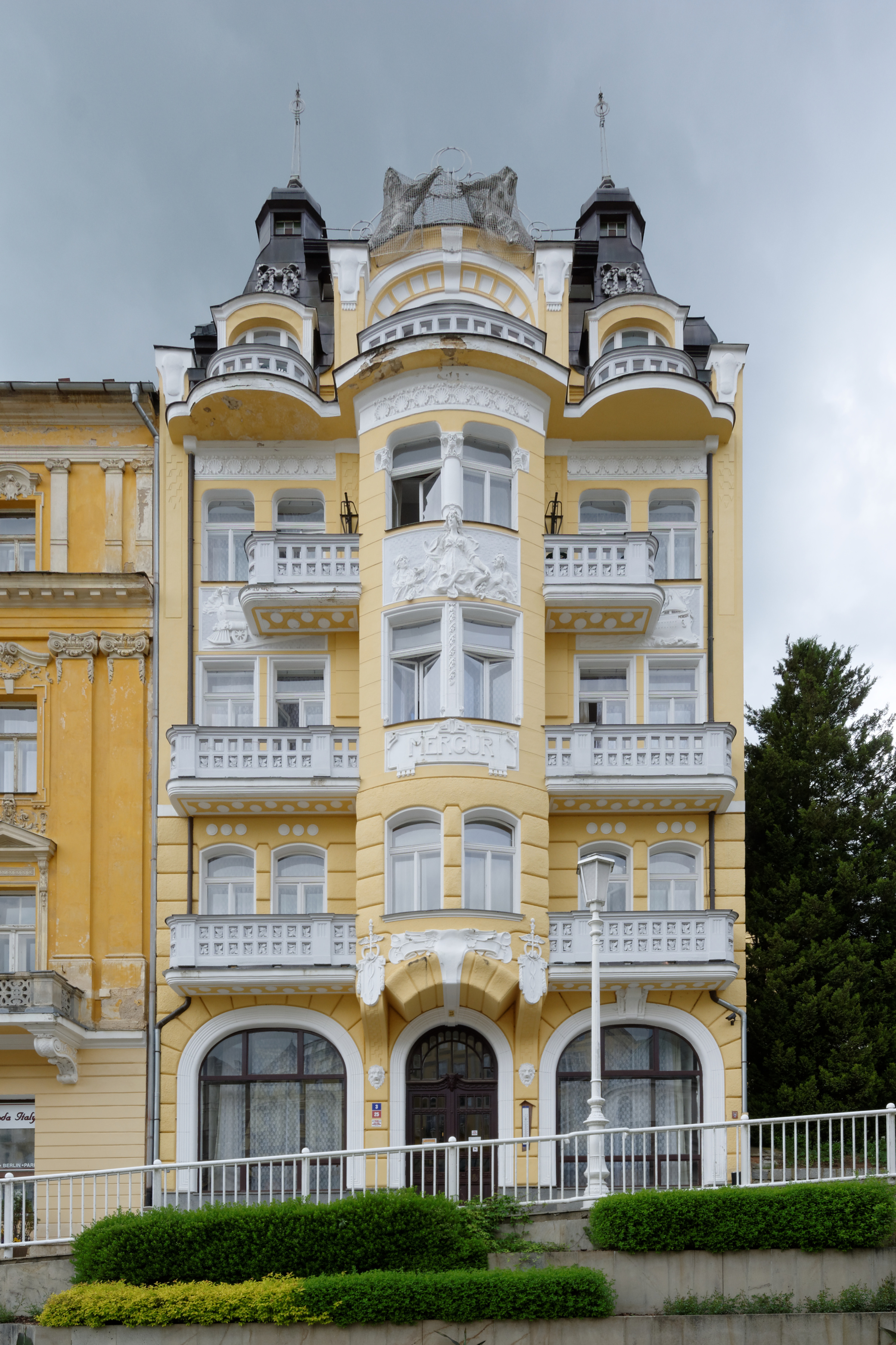 Lázeňský dům Jirásek / Merkur, Mariánské Lázně, Masarykova 25/3, Mariánské Lázně.